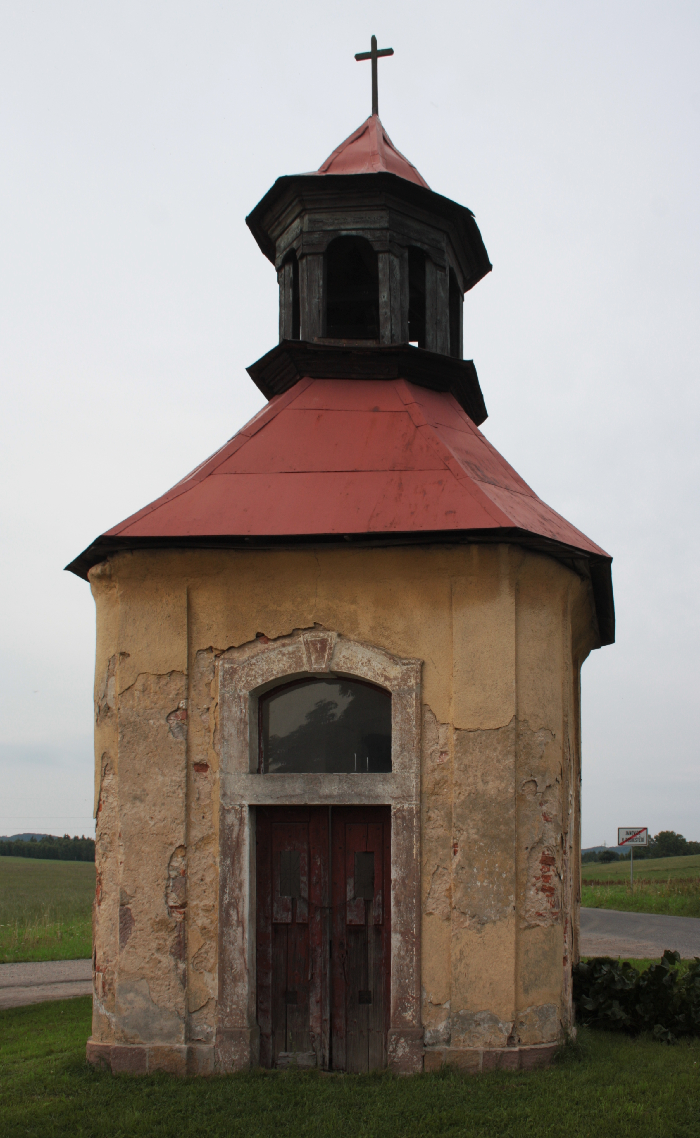 Janovice v Podještědí, kaplička